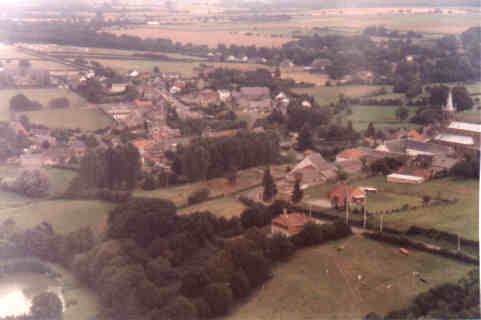 Limont Fontaine vu du ciel Photo personnelle Publiée le 11/01/2007 Auteur : BernardLimont Limont-Fontaine est un petit village du nord pas de calais, juste a côté de Maubeuge.